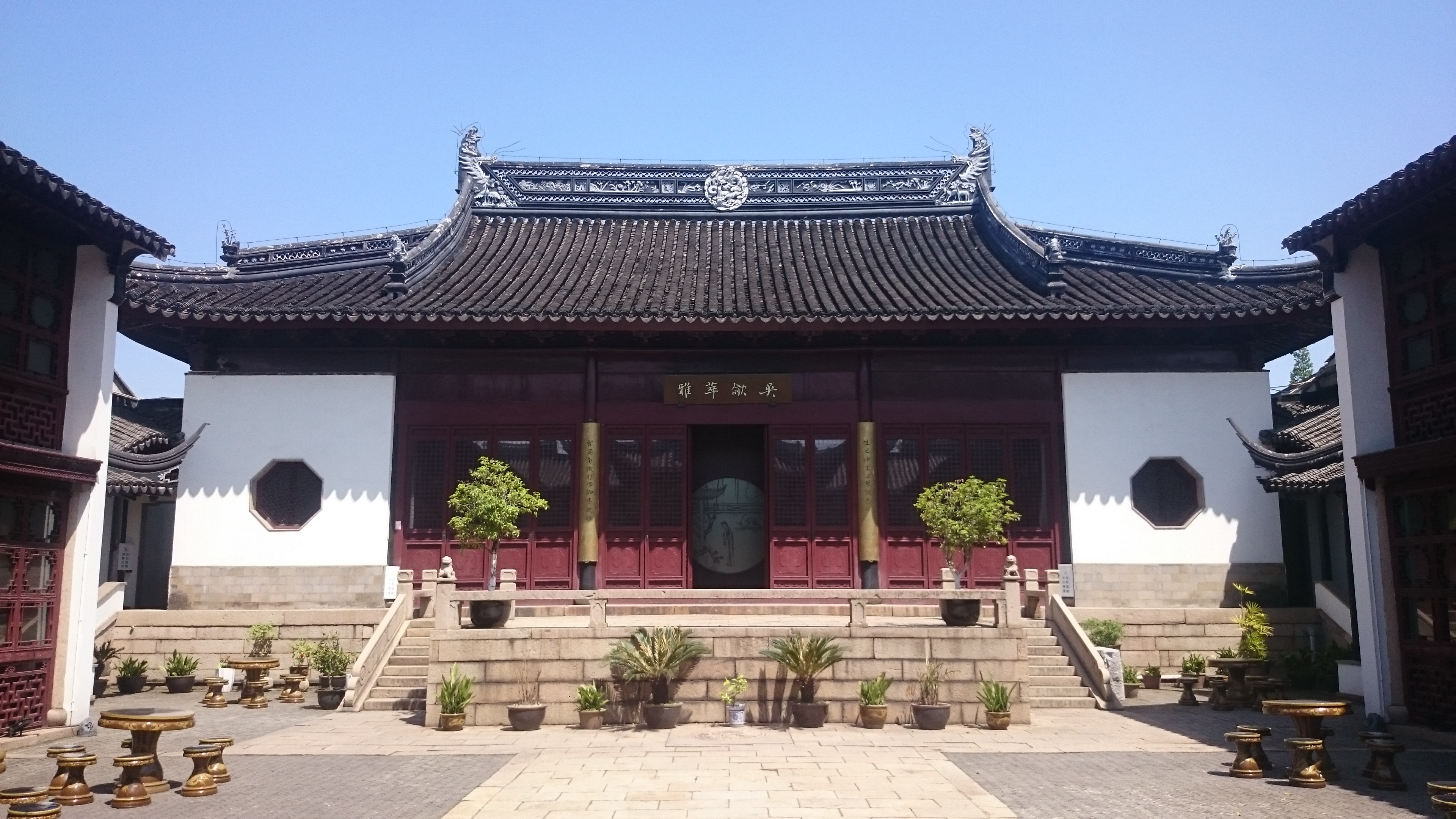 苏州戏曲博物馆 中国昆曲博物馆 全晋会馆 正殿（大殿）